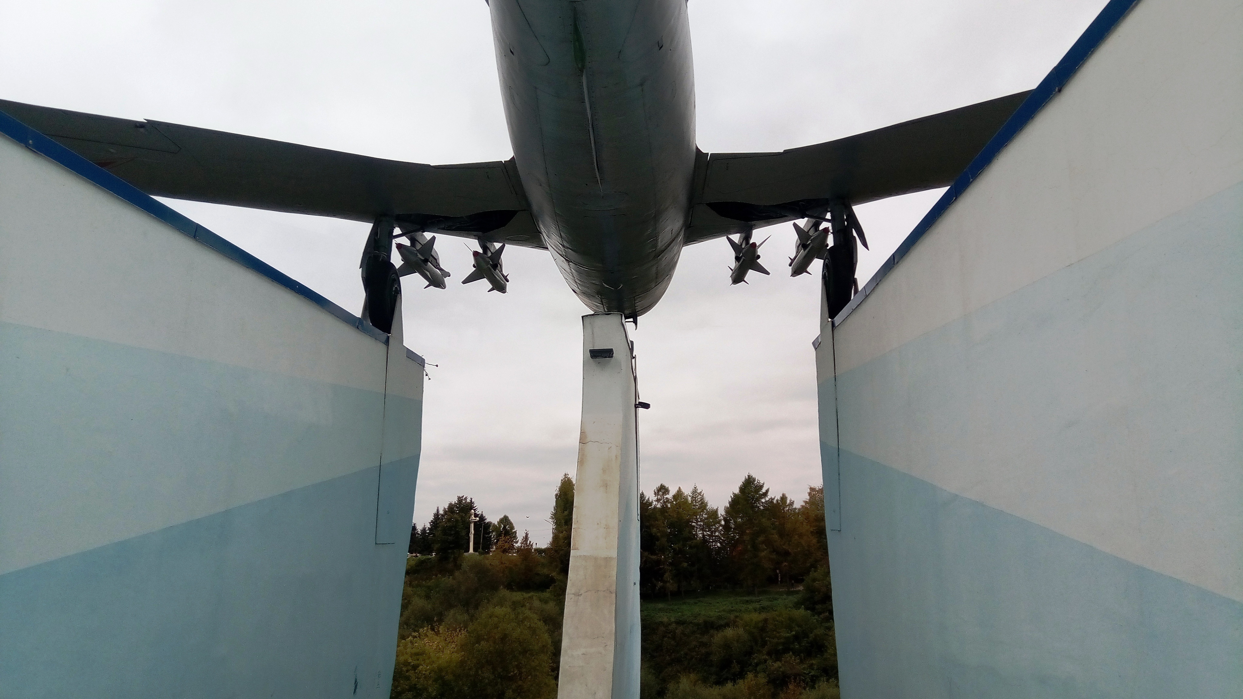 Памятник советским лётчикам МиГ-17 (Ржев)